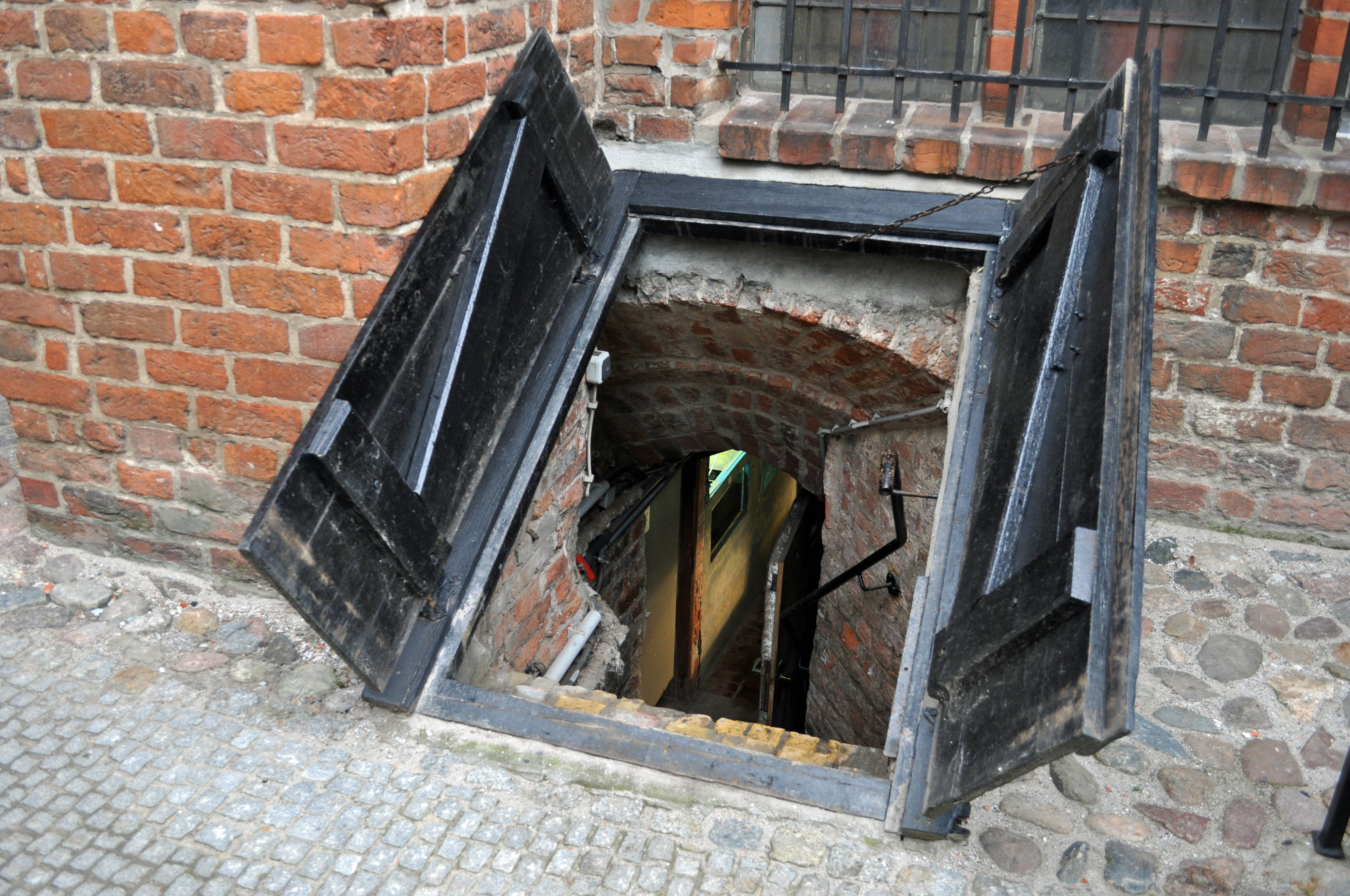 Im Meeresmuseum Stralsund. Das Deutsche Meeresmuseum ist in der ehemaligen Katharinenkirche untergebracht.